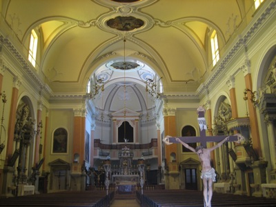 Church of St. Anthony in Veli Losinj / Crkva sv. Antuna Pustinjaka u Velom Losinju